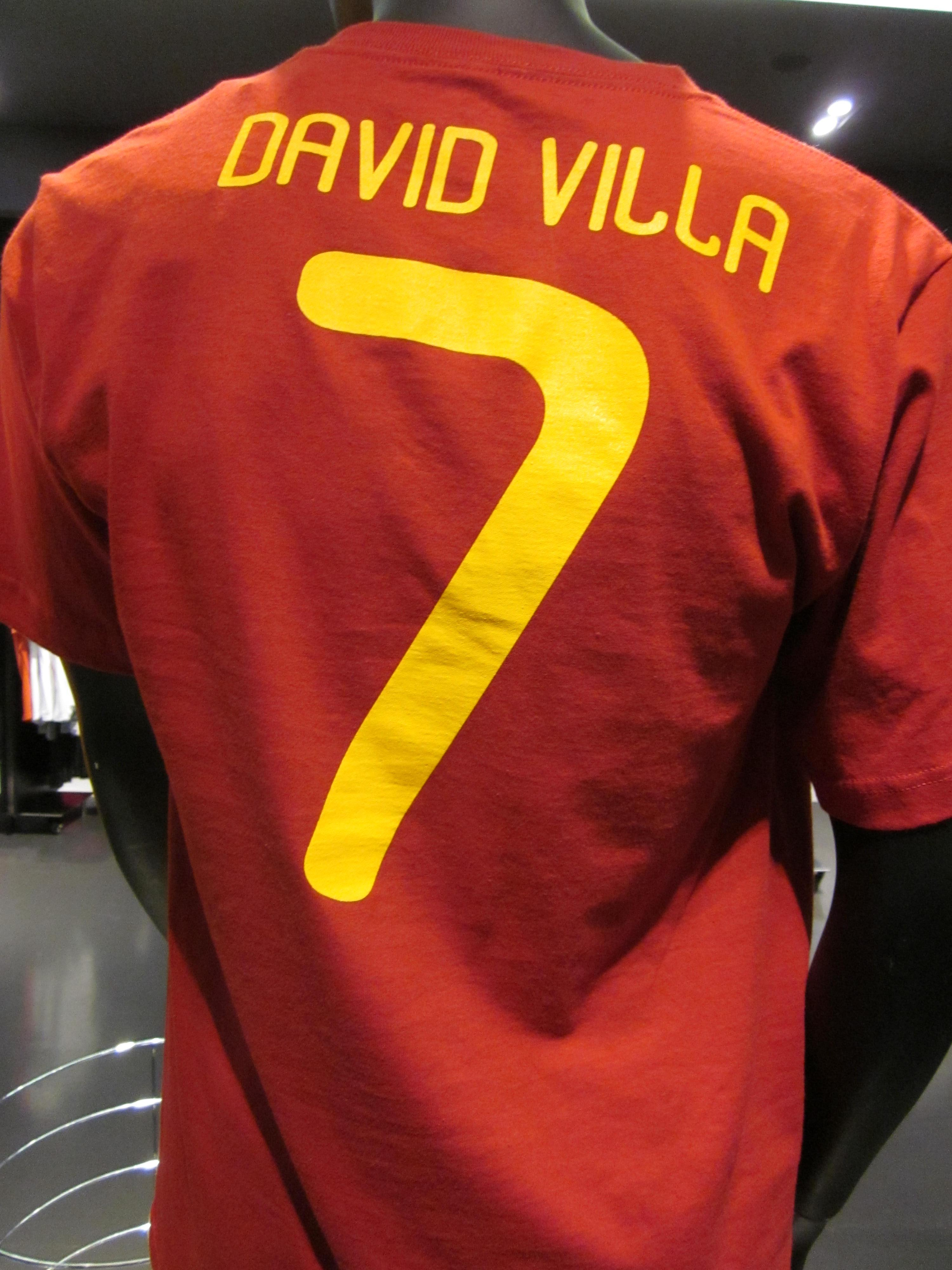 An Adidas David Villa shirt.